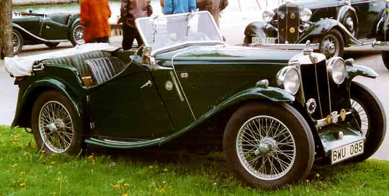 M.G. NA Magnette 4-Seater Tourer 1934